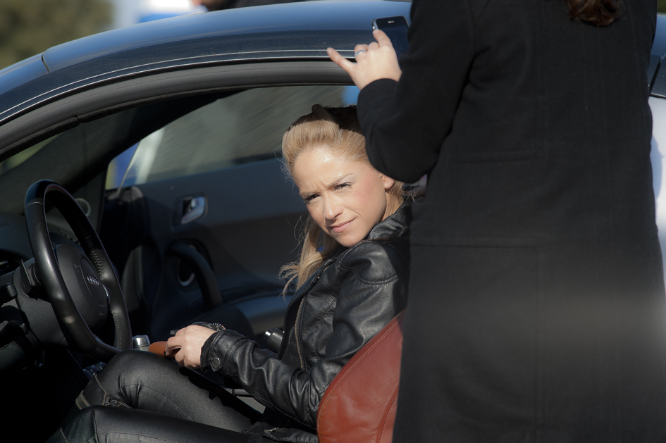 Speed for life